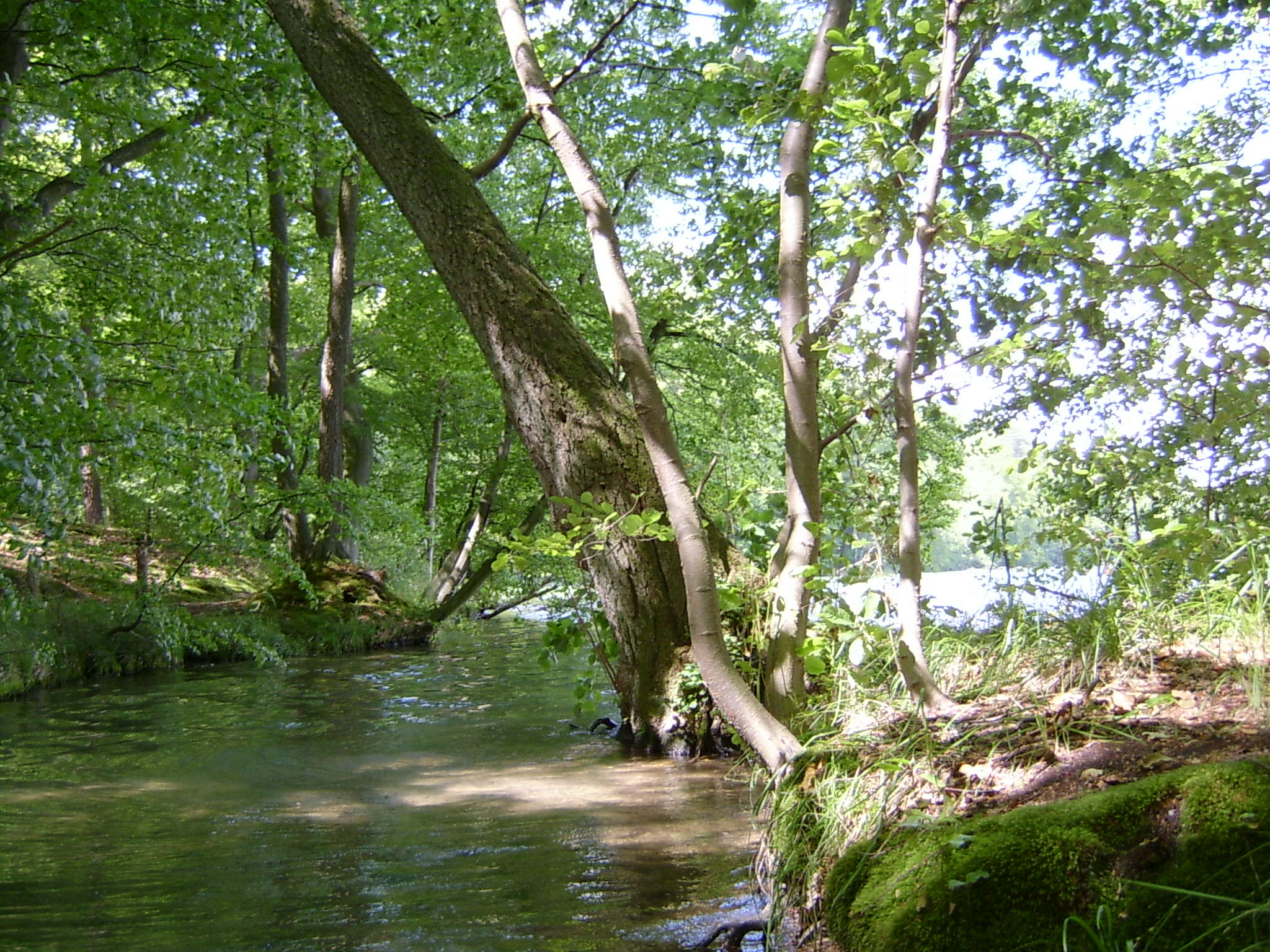 Santoczna - ujście z jeziora Siczno Moczydelskie